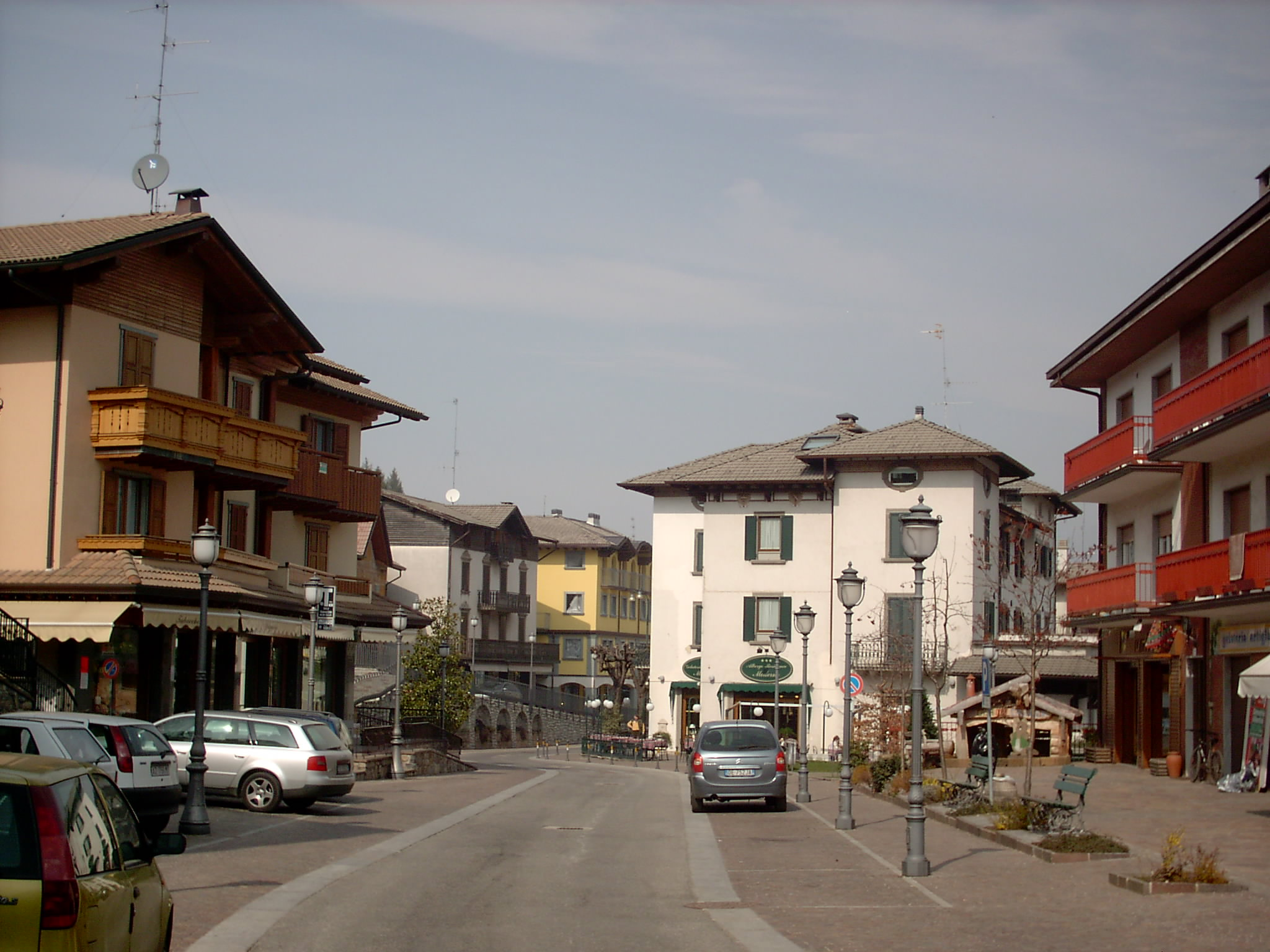 Selvino, Bergamo, Italia